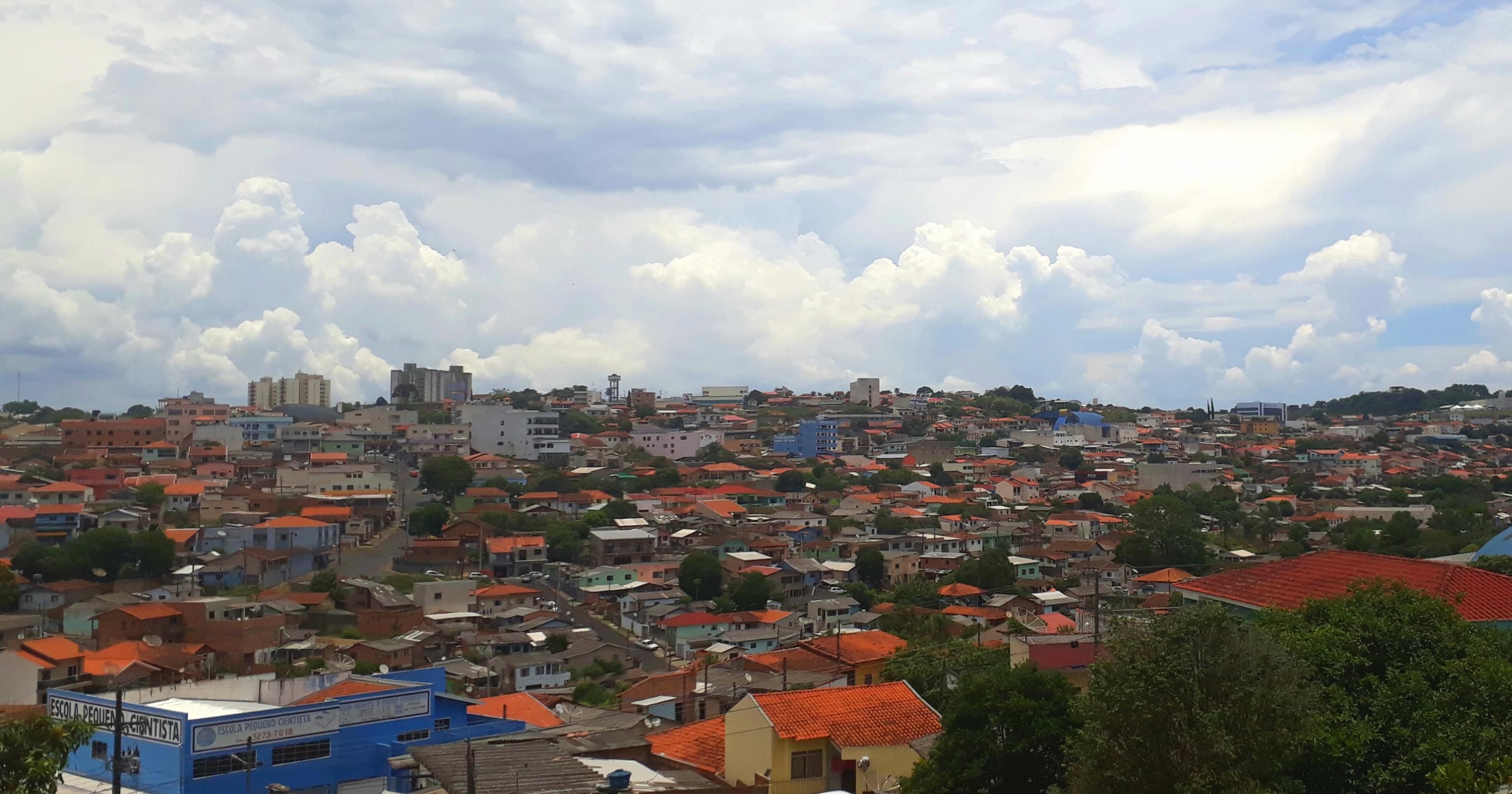 Vista do bairro Socomim, em Telêmaco Borba, no Paraná.